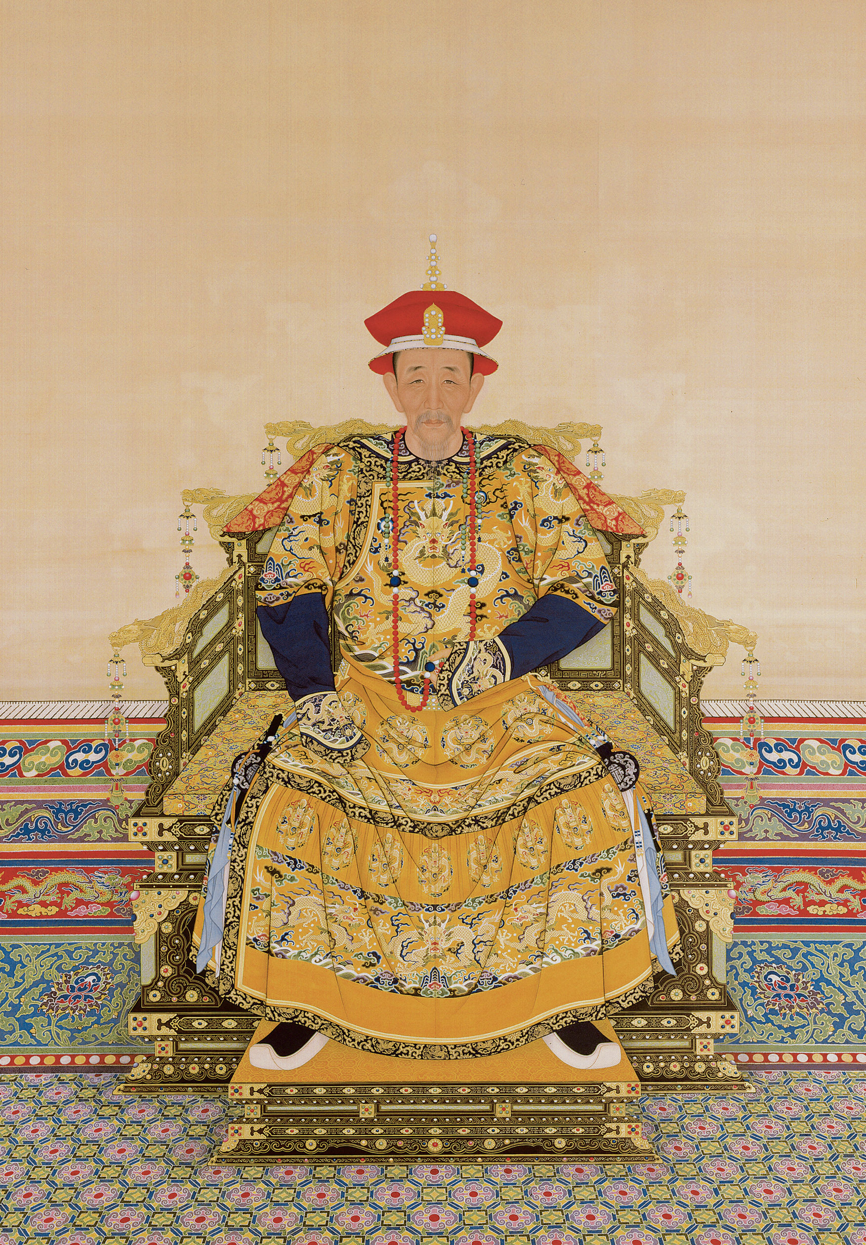 康熙帝朝服像